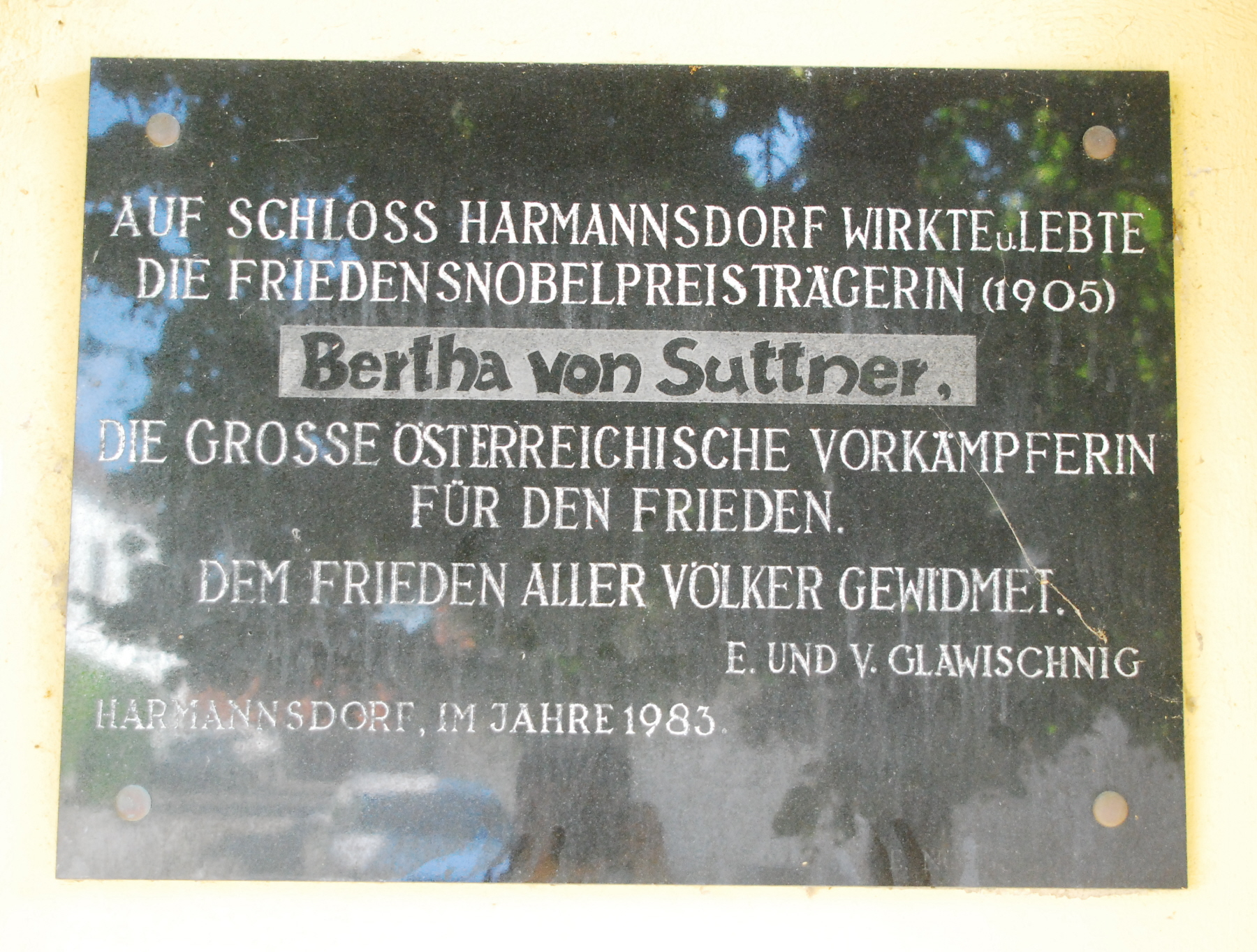 Gedenktafel für Bertha von Suttner am Schloss Harmannsdorf in Niederösterreich